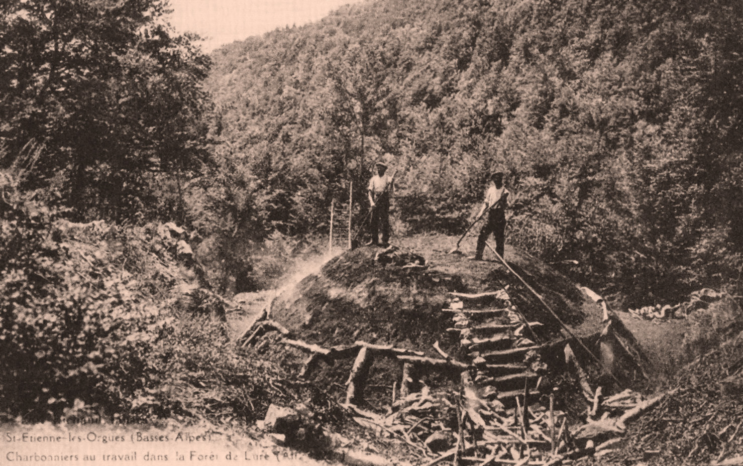 Charbonniers dans la montagne de Lure au début du XXe siècle